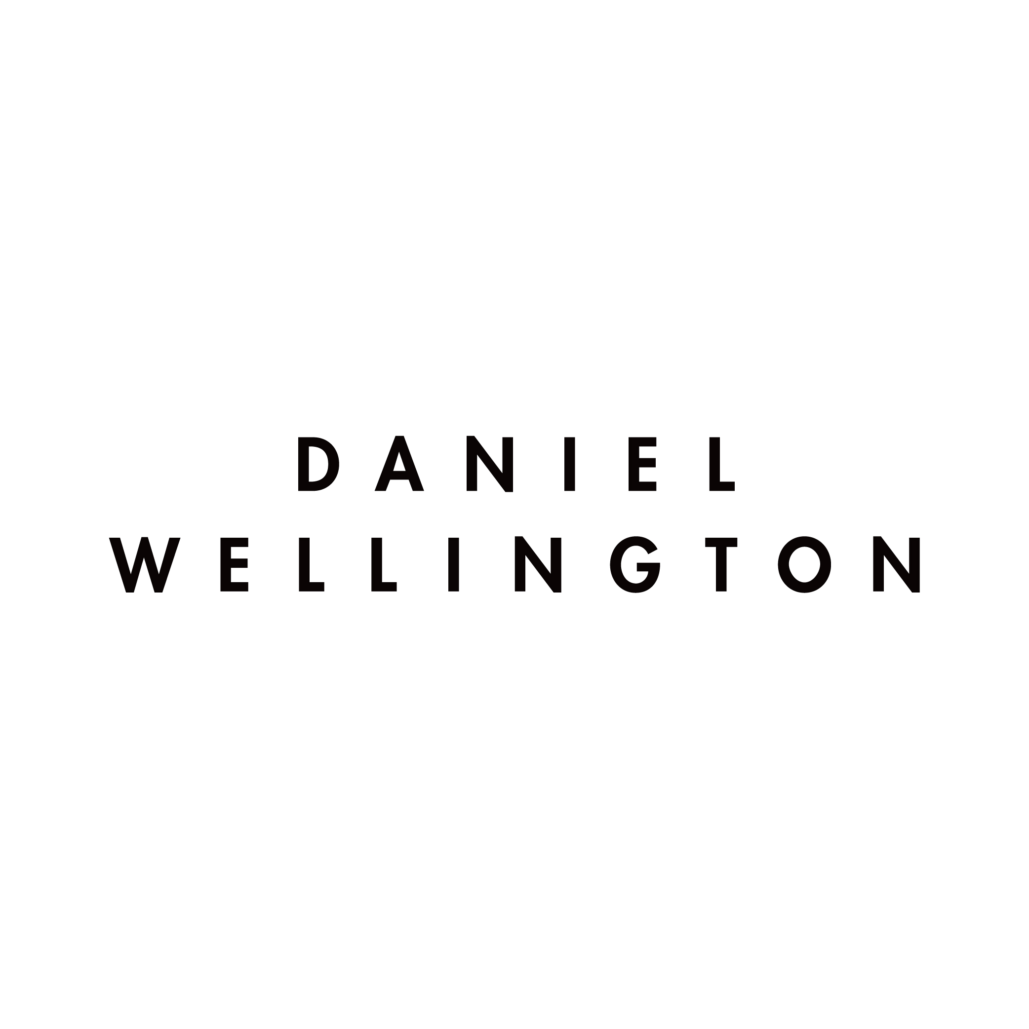 ロゴ